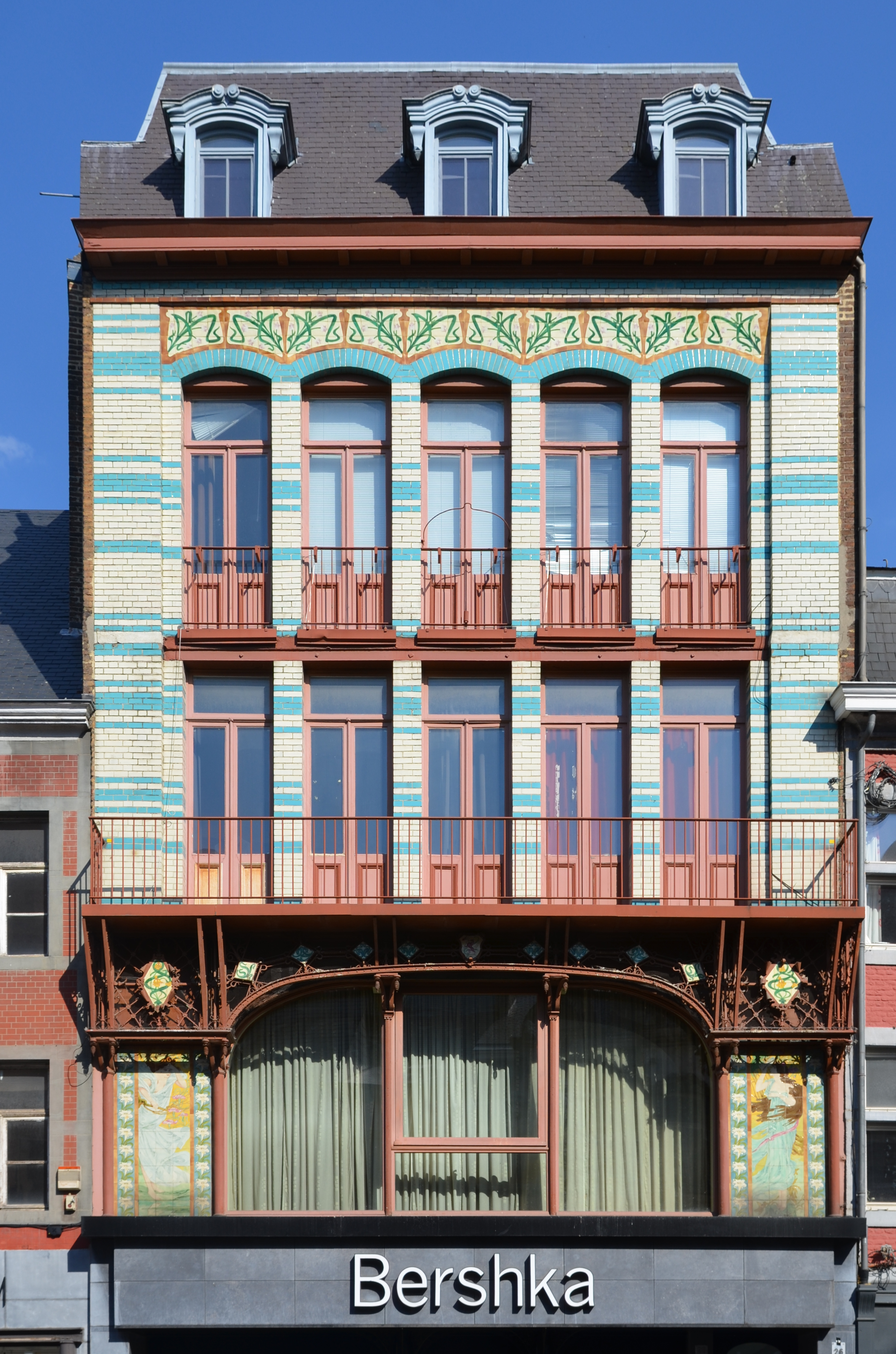 Namur - rue de Fer - façade de style Art nouveau.